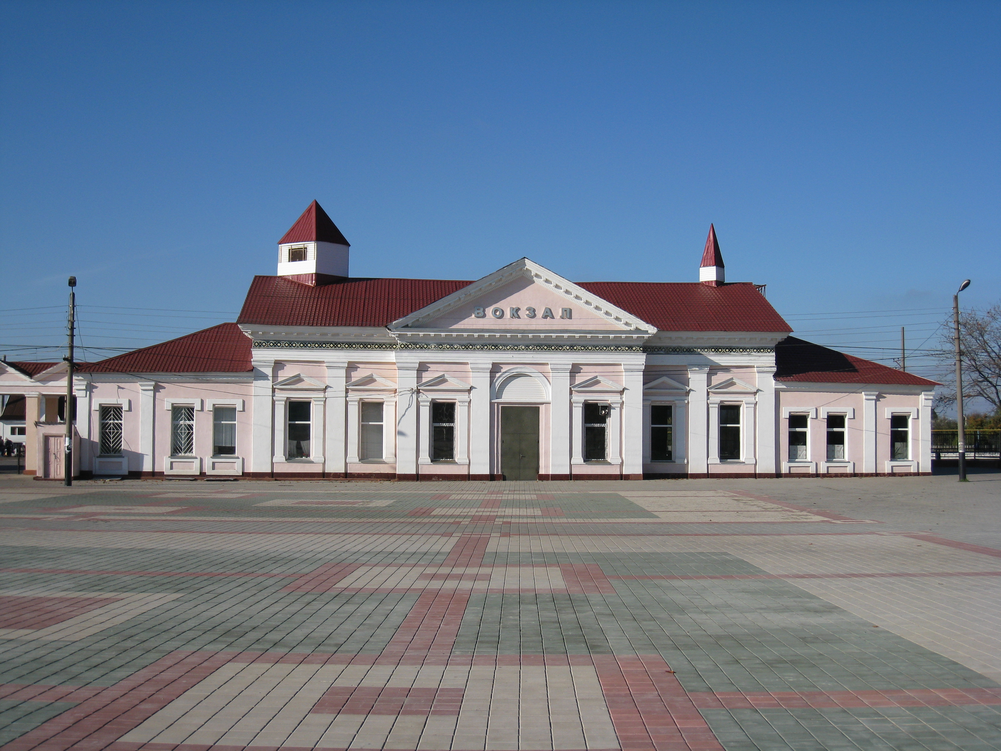 Здание вокзала п. Прохоровка